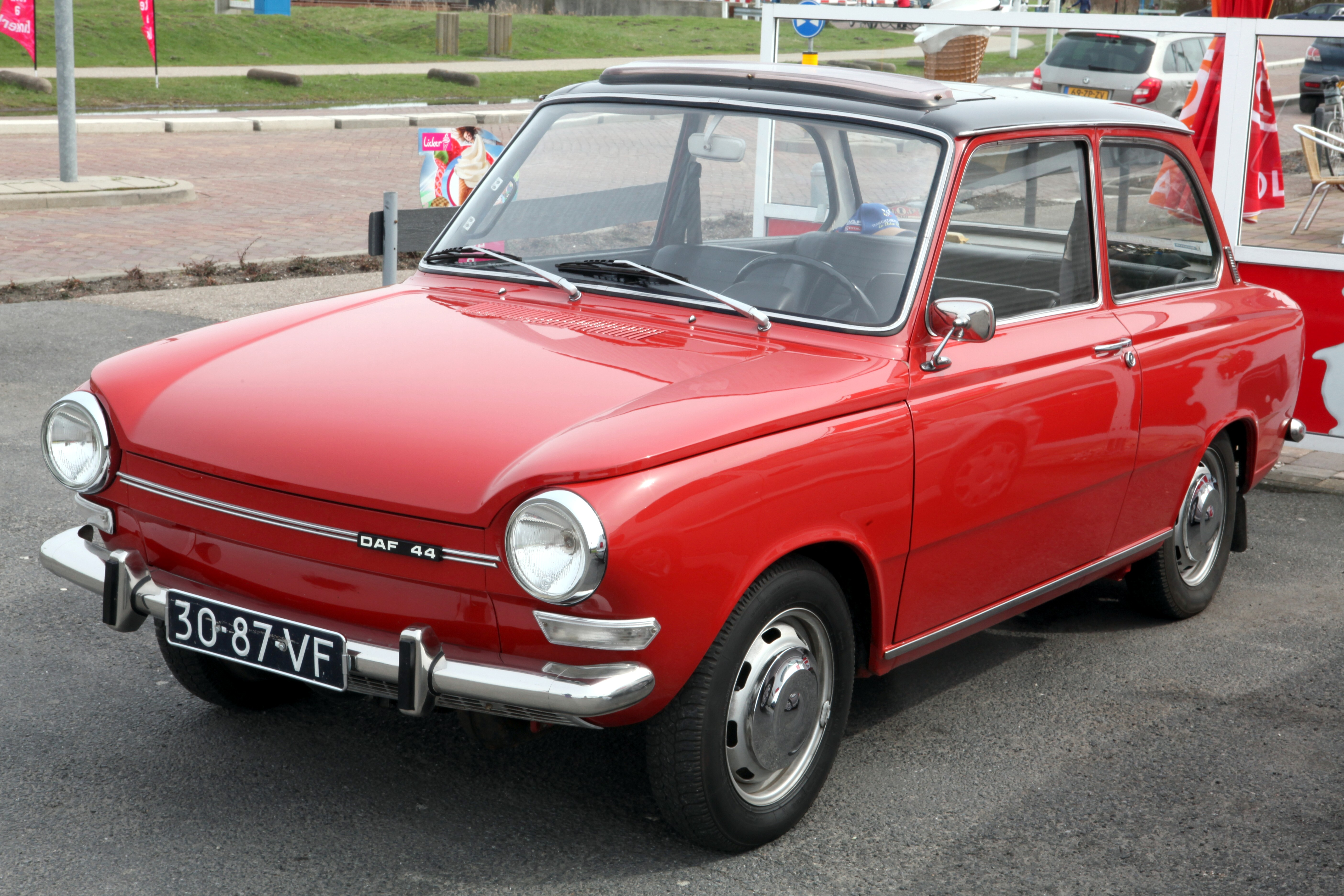 Daf 44